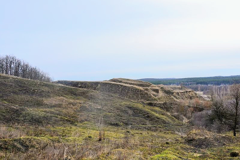 Городище в селі Заріччя Васильківського району